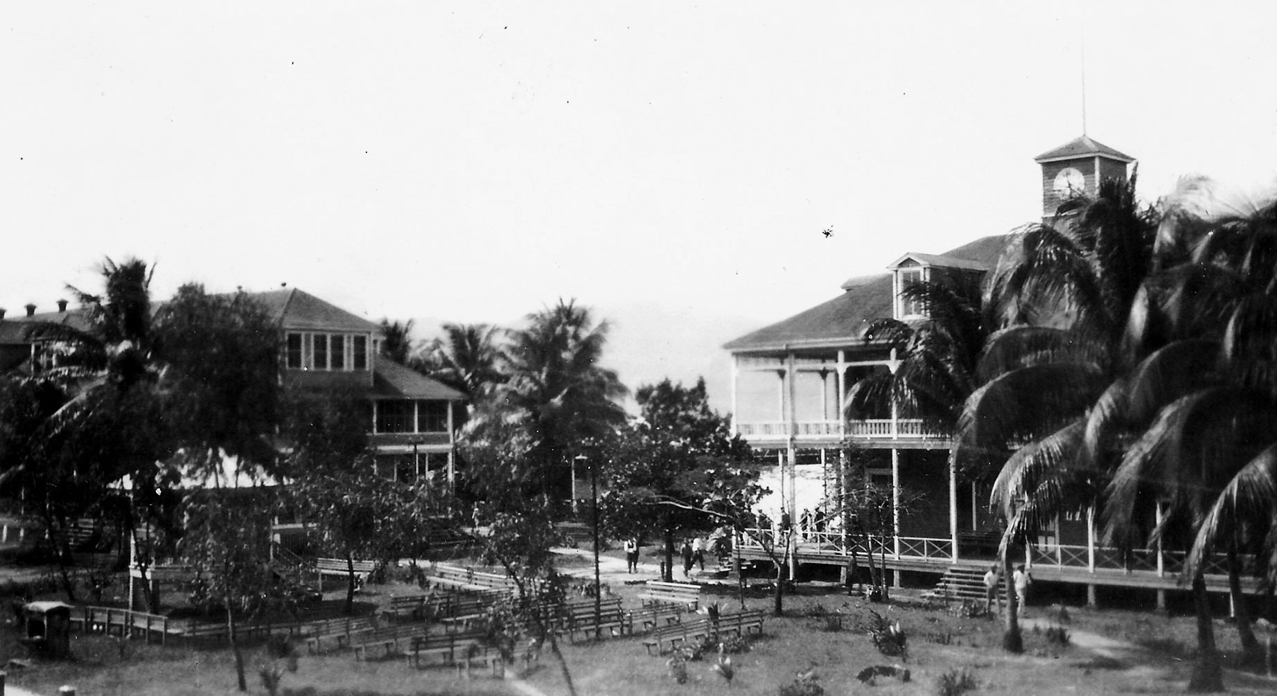 Hotel Puerto Barrios en 1925.